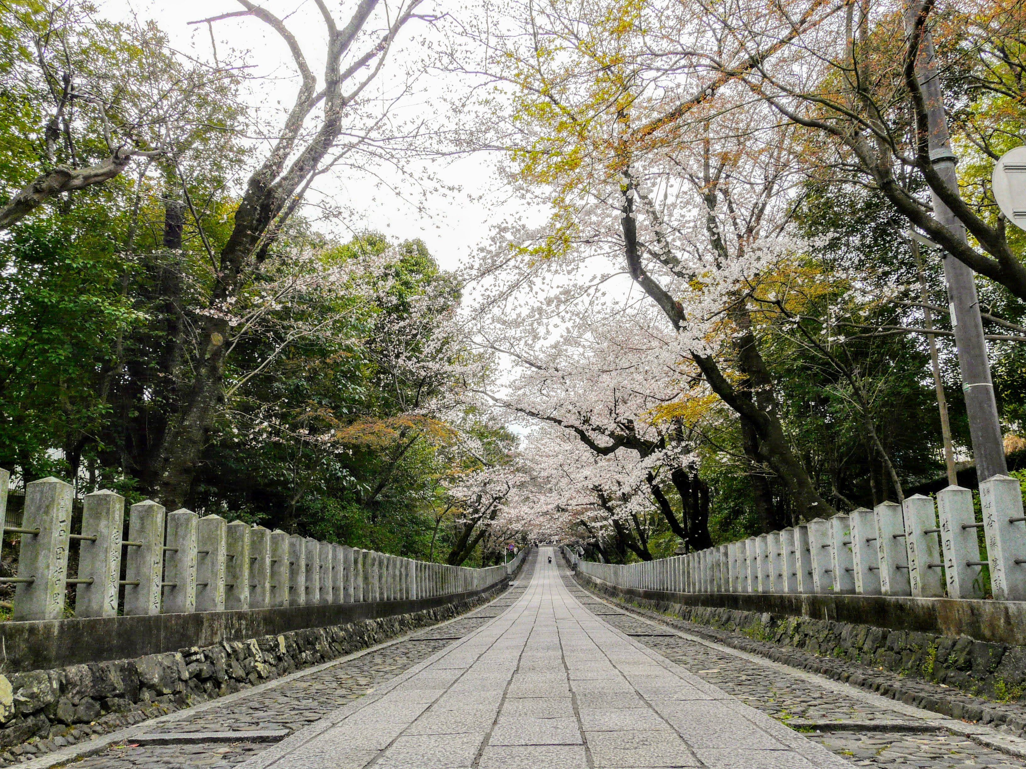 向日神社の参道。桜が開花している。 Panasonic Lumix DMC-FZ18